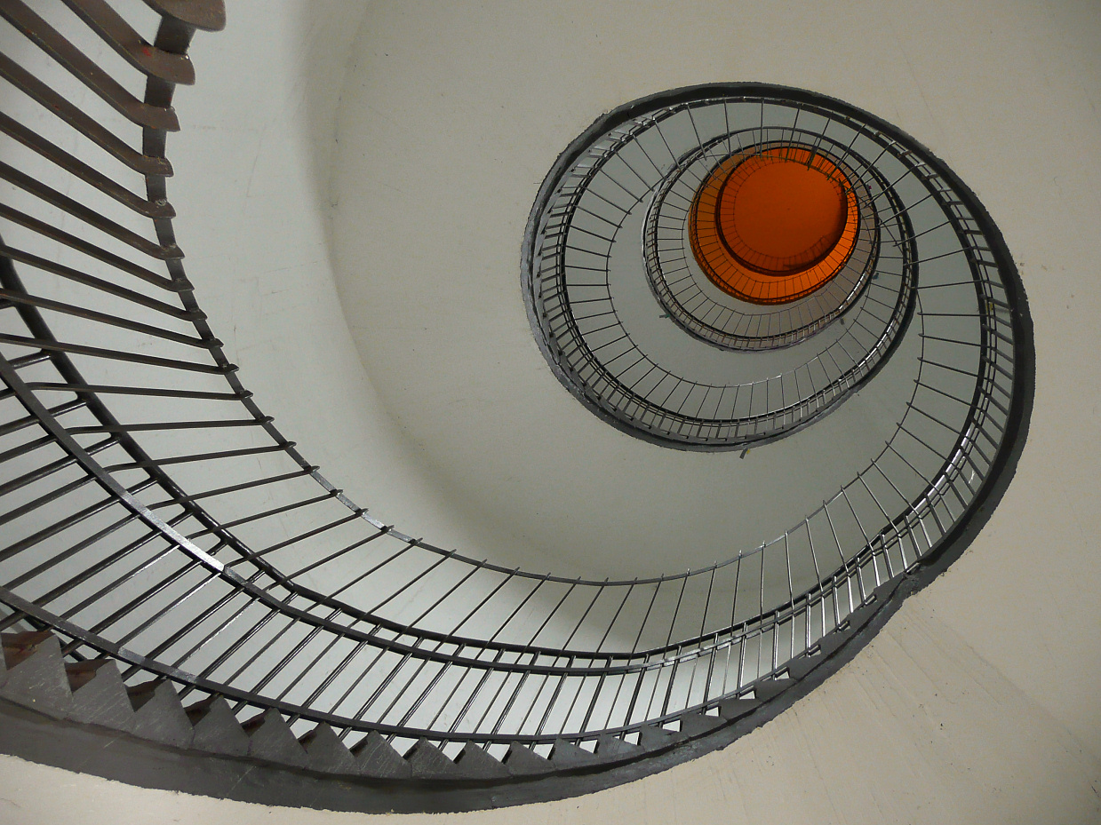 Treppenhaus im Flakbunker auf dem Heiliggeistfeld Hamburg